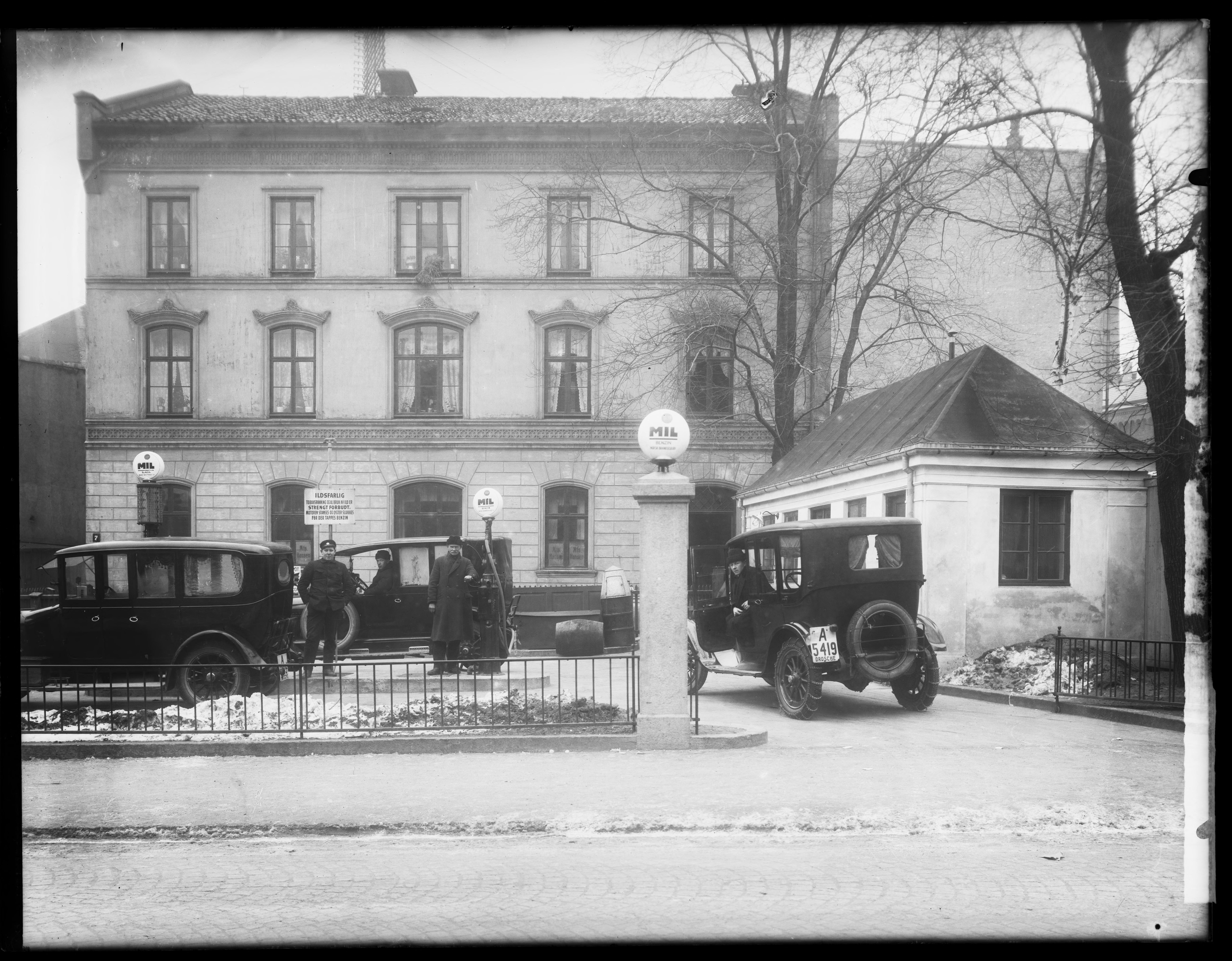 Bildet er hentet fra Nasjonalbibliotekets bildesamling. Anmerkninger til bildet var: Påskrift arkivark: Norsk Brændselolje Eldste arkivnummer: 709 Yngre arkivnummer: 356 Oslo, Oslo, Oslo